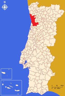 AMP_20130912